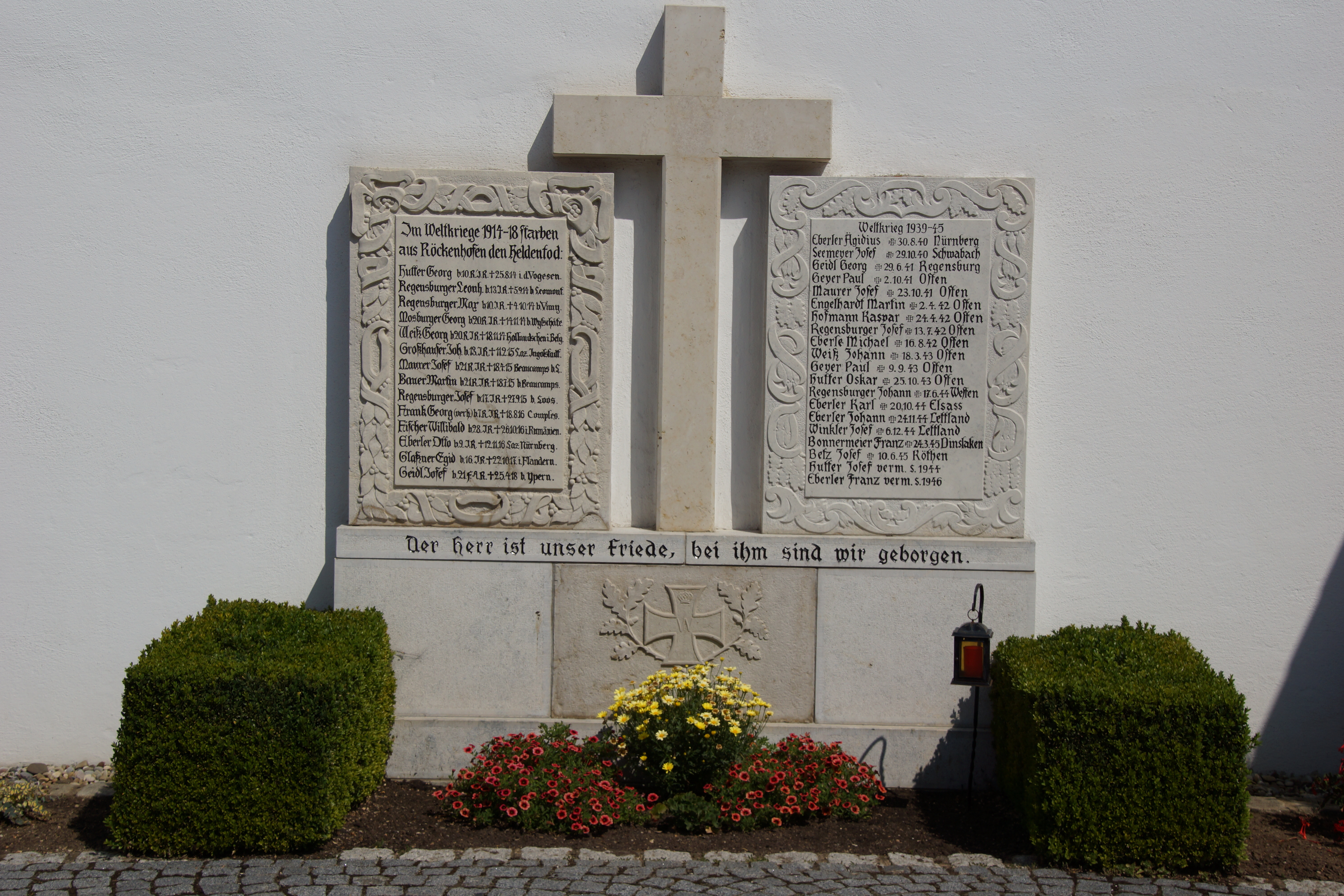 Die katholische Wehr- und Pfarrkirche im Juraort Röckenhofen bei Greding